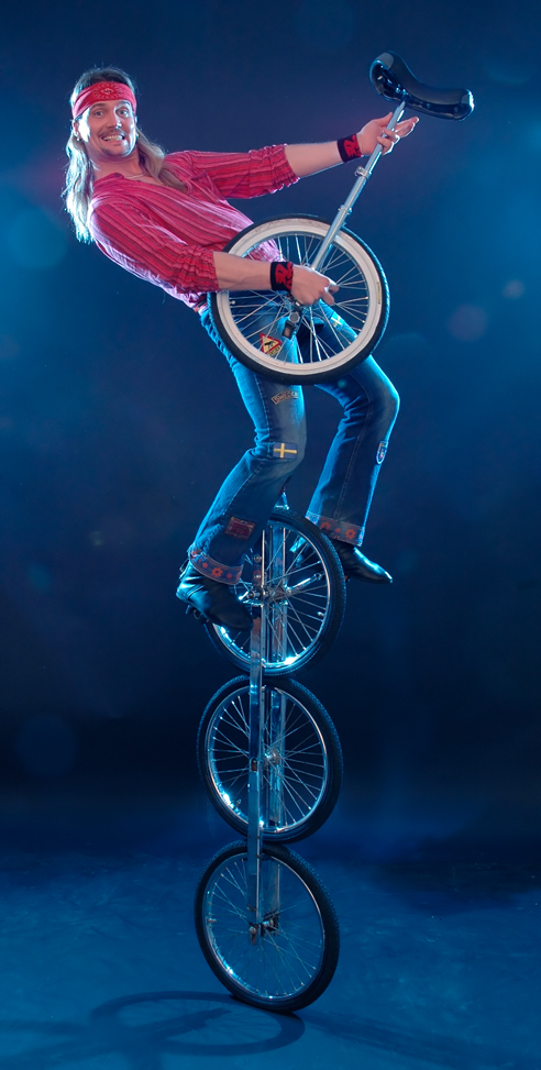 Teater Kolibri